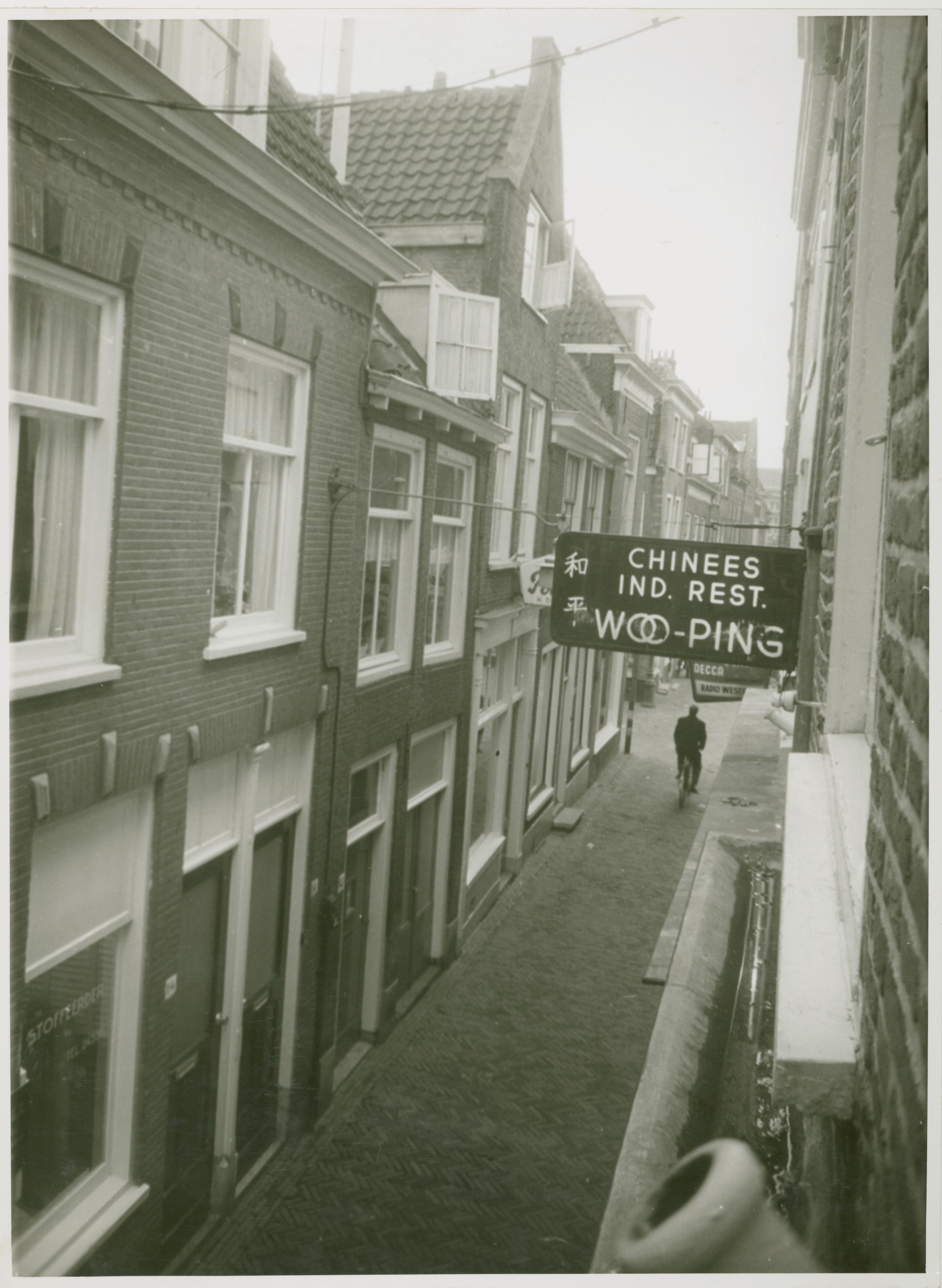 Diefsteeg gezien van nummer 14 tot de Pieterskerkgracht vanuit 1e verdieping van nummer 15. 1968